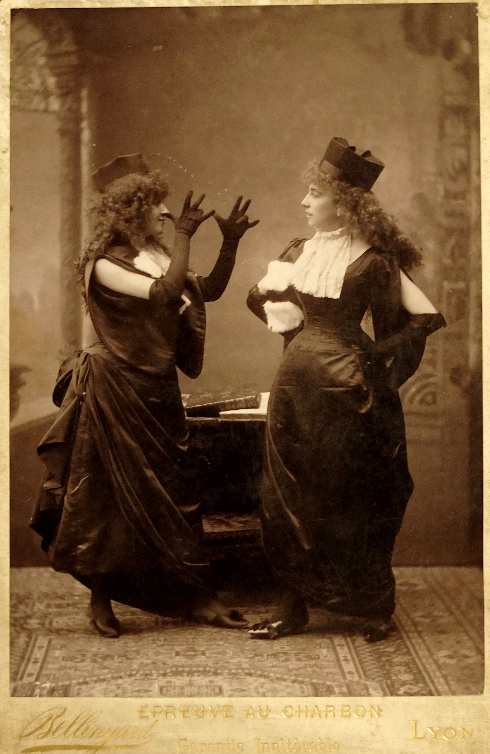 Photographie au format cabinet, photo humoristique, avocate(s), vers 1890. Procédé au charbon, Pierre Ballingard, Lyon. Collection privée.